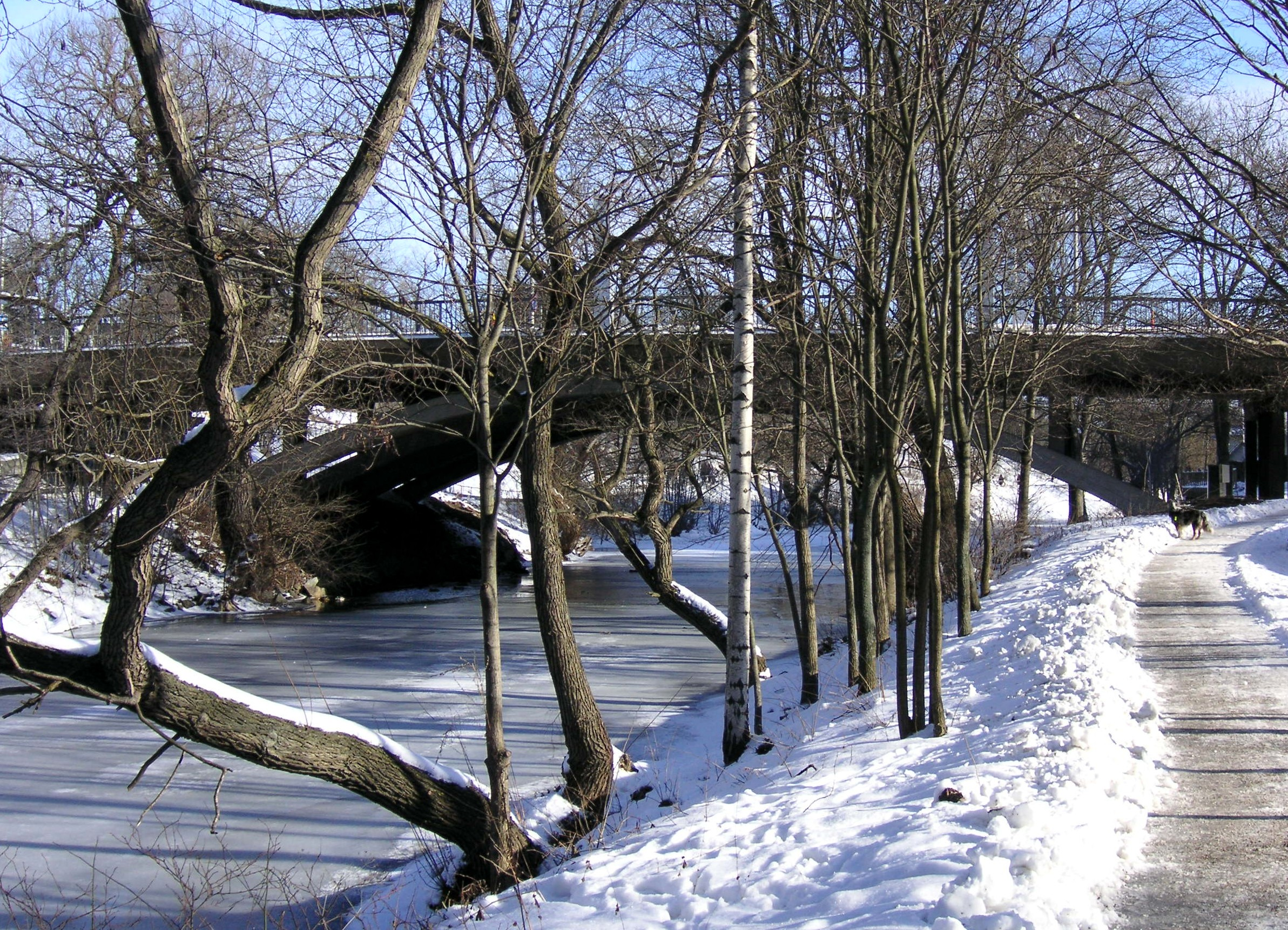 Karlbergskanalen med Ekelundsbron i Stockholm och Solna